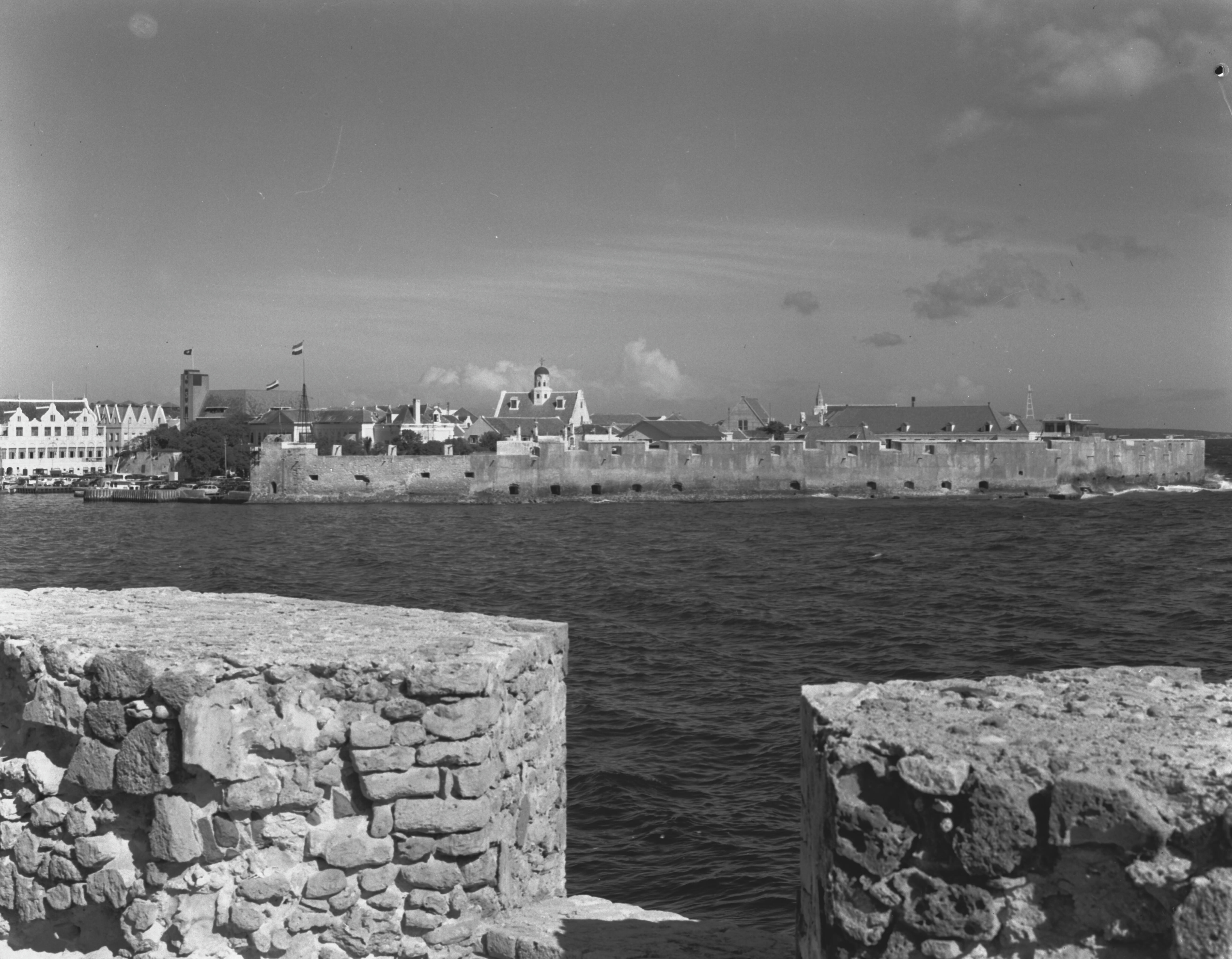 Punda, Waterfort gezien vanaf RiffortOnderwerp: forten